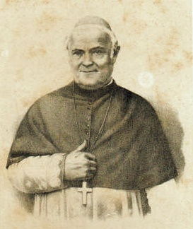 Kardinal Filippo de Angelis (1792-1877), Apostolischer Nuntius in der Schweiz